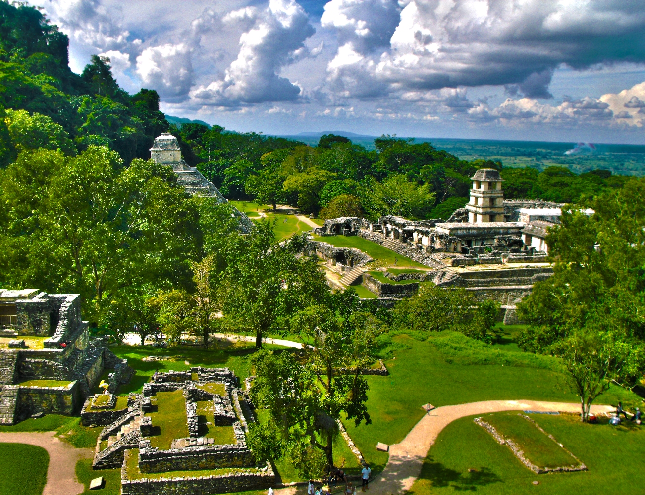 Palenque